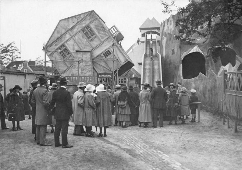 Neue Volksbelustigungen im Luna-Park in Berlin des größten Vergnügungs-Parks in Deutschland. Das drehbare Haus eine Hauptattraktion des Luna Parkes.